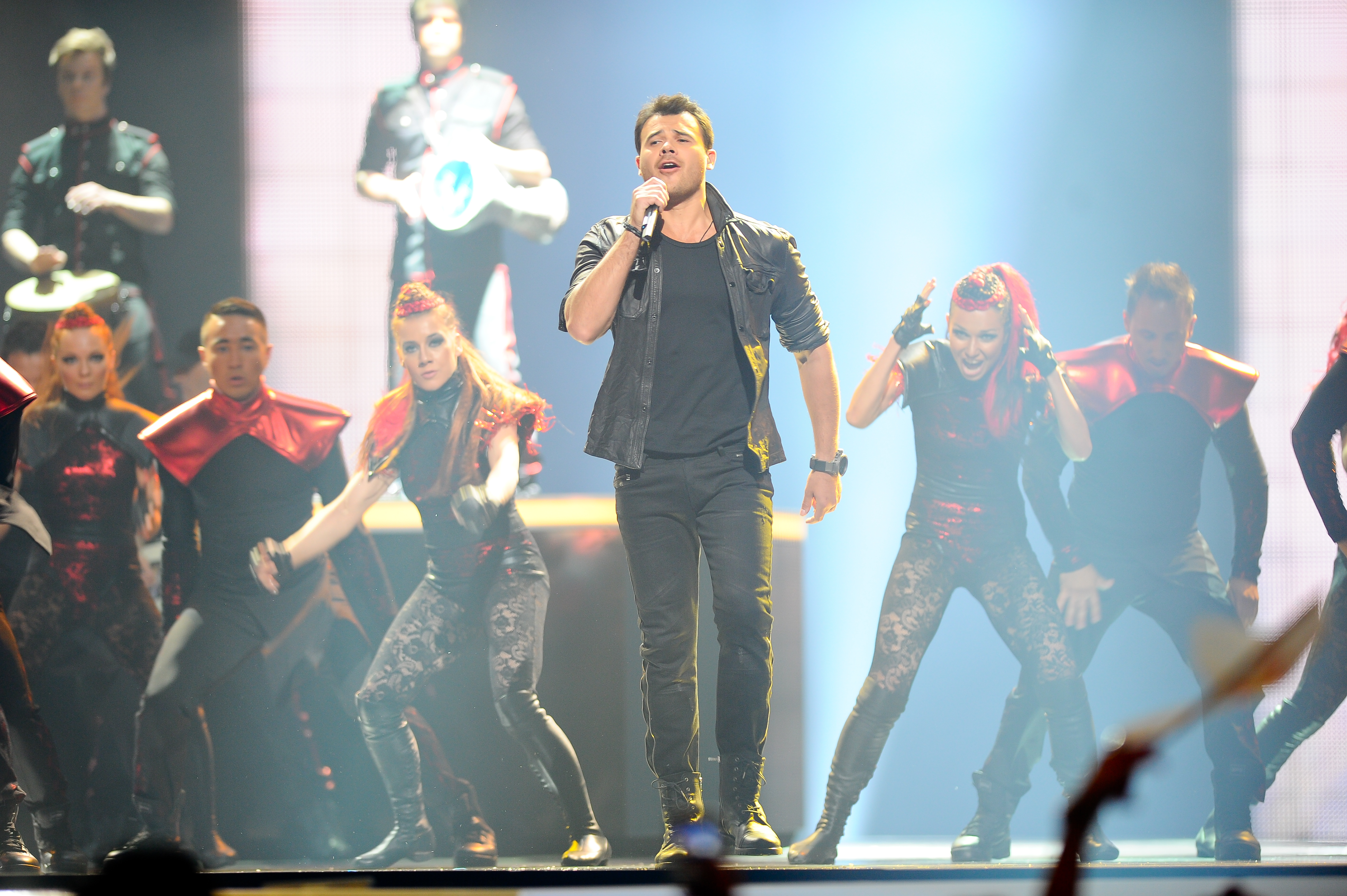 Эмин Агаларов